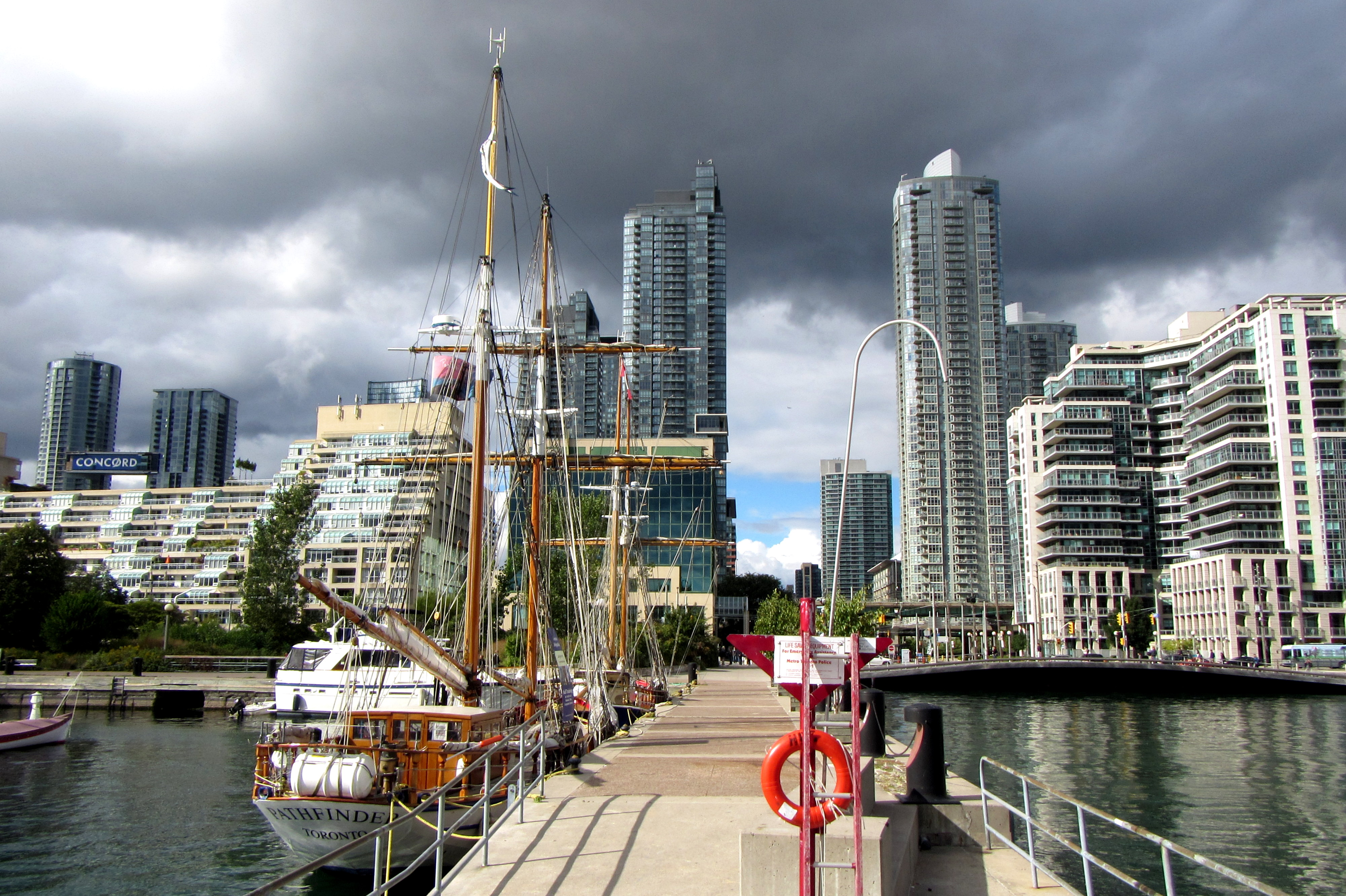 Ensoleillé et des pluies